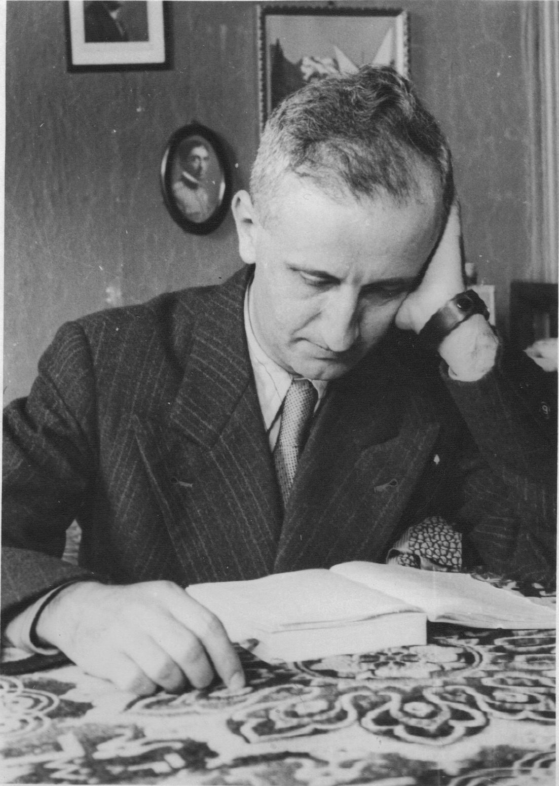 Aldo Ferrabino